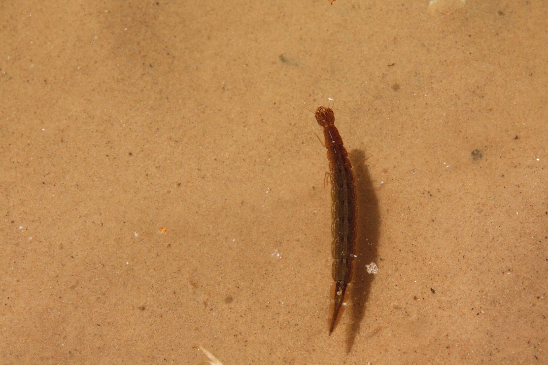 ujuri vastne